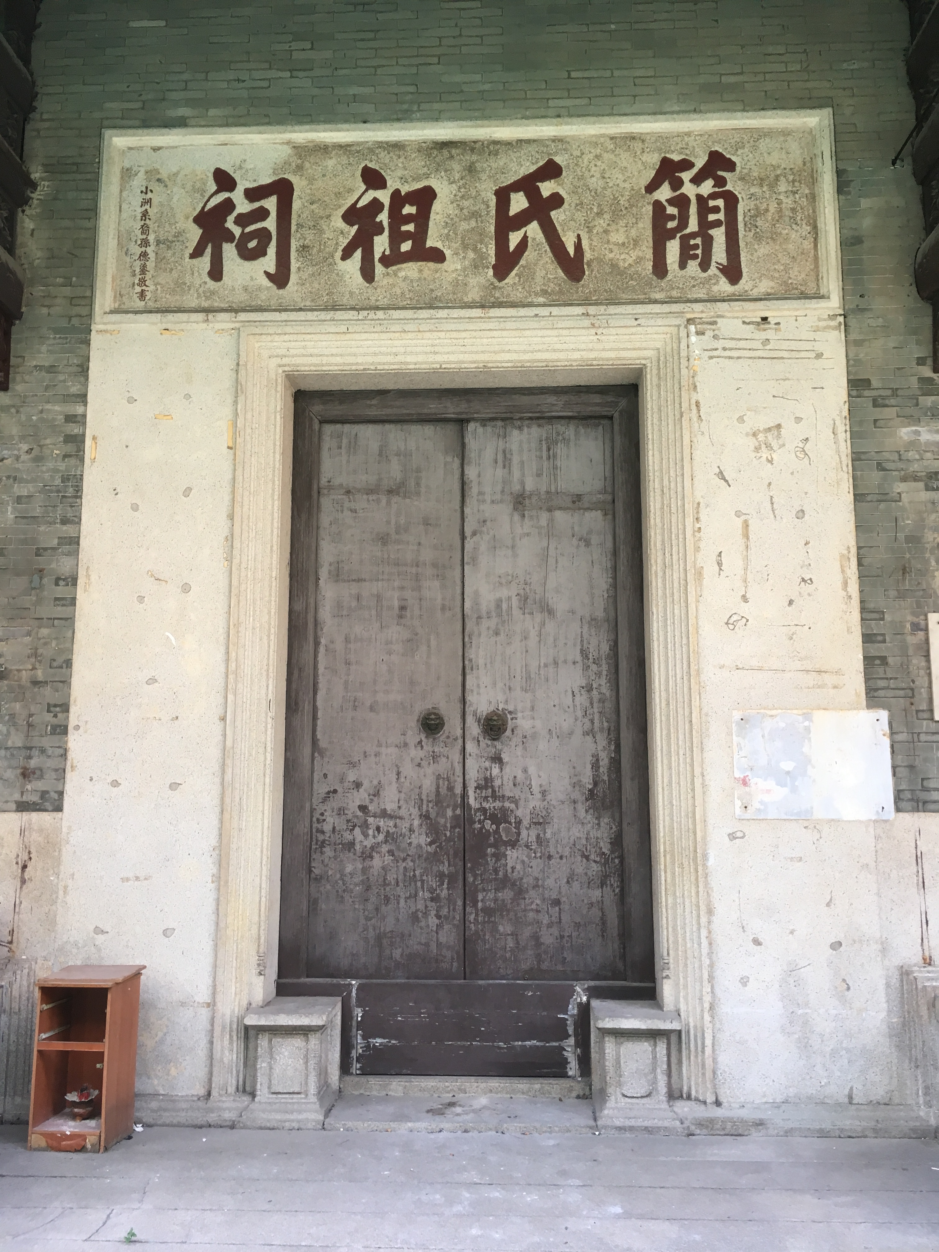 中文（香港）: 位於廣州市越秀區盤福路98號越秀外國語學校内的簡氏祖祠大門